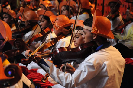 Meninos do Coque estrelaram, ao lado de Alcymar Monteiro, especial de TV que foi ao ar pela TV Globo, em 2010